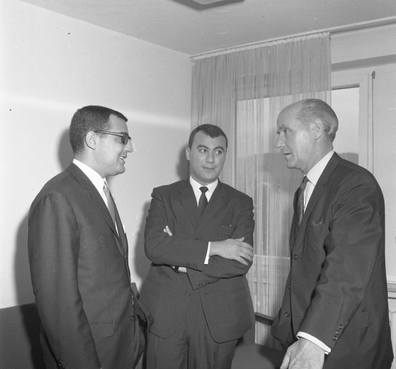 Unterzeichnung eines Schlußabkommens mit Tunesien im BMZ v.l.n.r.: Der tunesische Botschafter Ben Ayed; der Leiter der tunesischen Verhandlungsdelegation, M. Ismail Khelil, Abteilungsleiter im tunesischen Außenministerium; der Leiter der deutschen Verhandlungsdelegation, Ministerialdirektor Dr. G. A.[Gustav Adolf] Sonnenhol vom Bundesministerium für wirtschaftliche Zusammenarbeit.